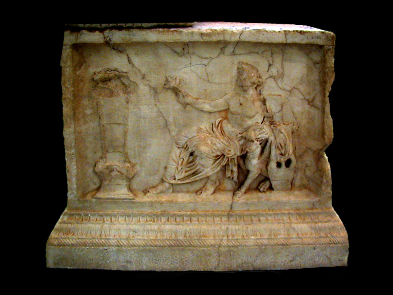 détail de l'autel de la gens augusta